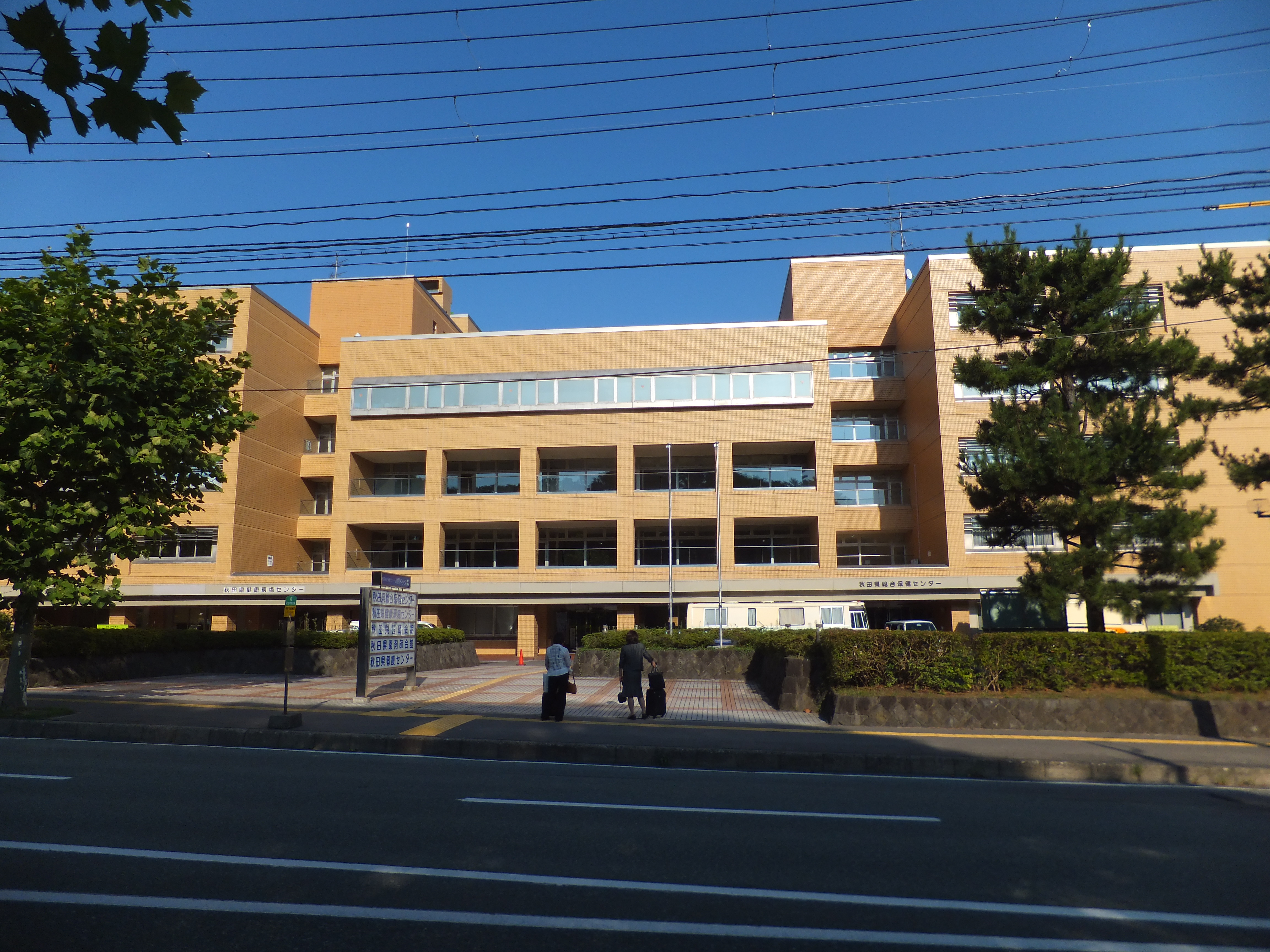 秋田県健康環境センター本館庁舎（秋田市千秋久保田町）。秋田県健康環境センターのほか、秋田県総合保健センター、秋田県医師会館、秋田県看護師会館、秋田県看護センターが入居する。